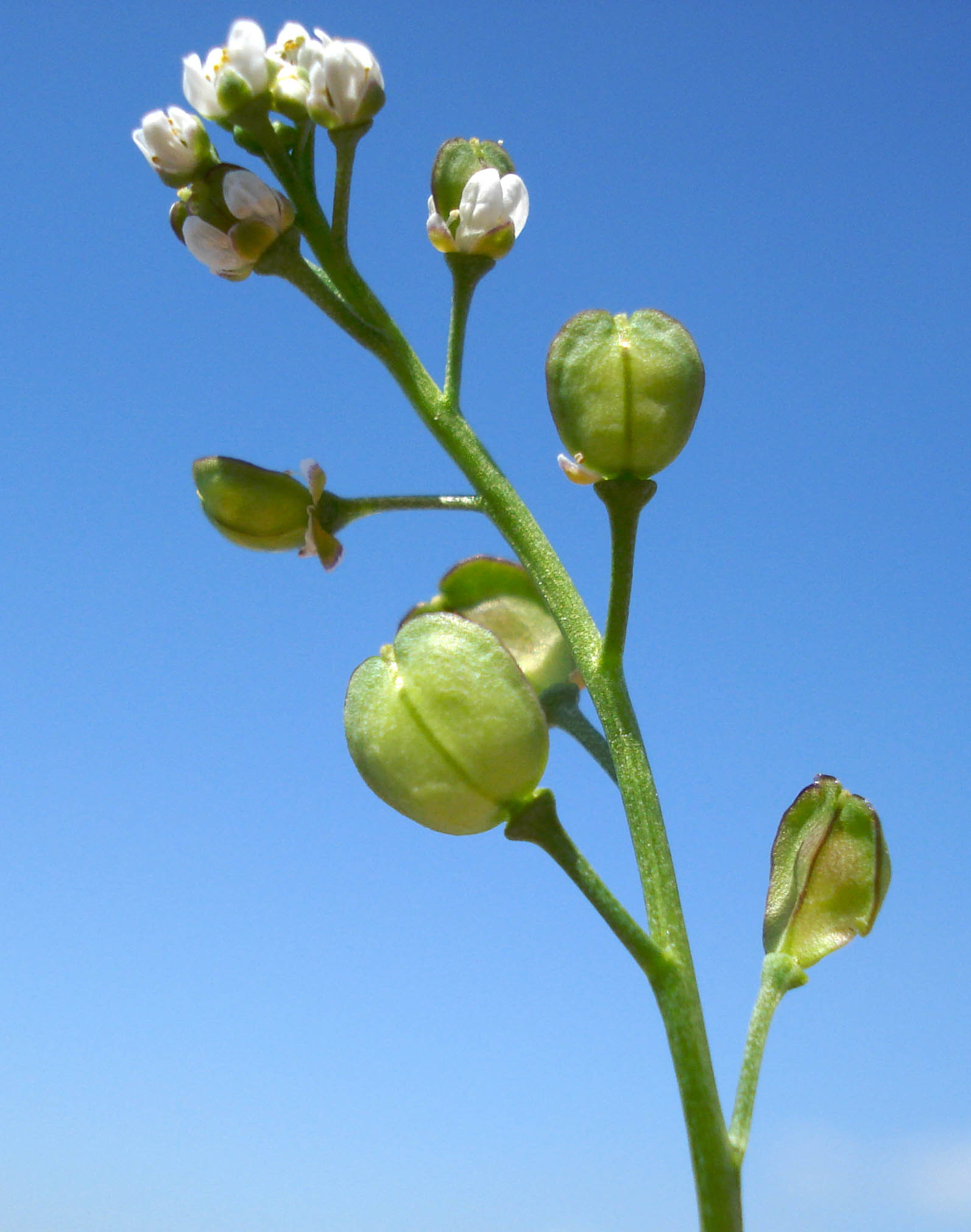 Teesdalia nudicaulis (Unterfranken, Germany)